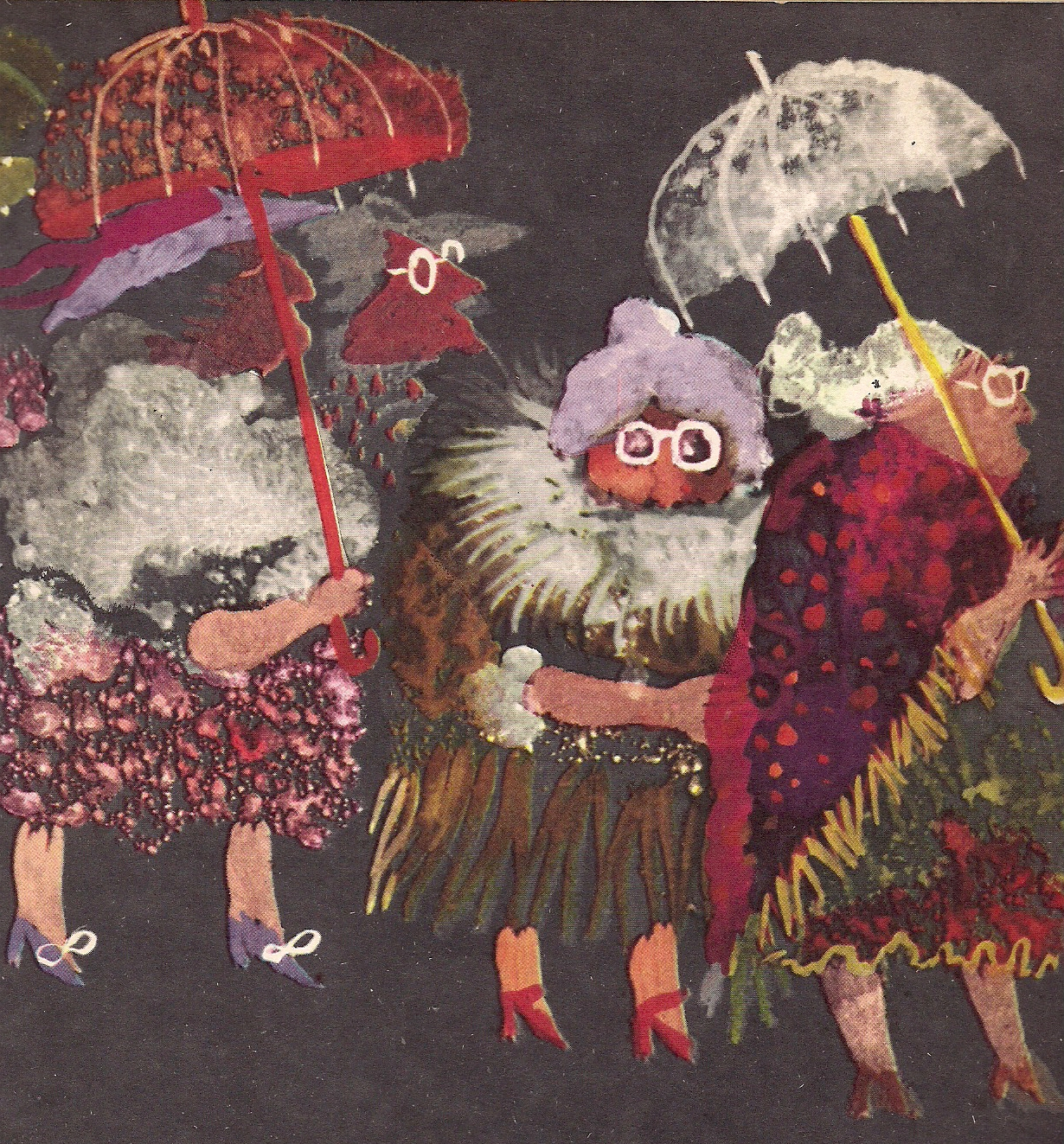 מתוך הספר כף עץ וקדרה שטוחה של נורית זרחי